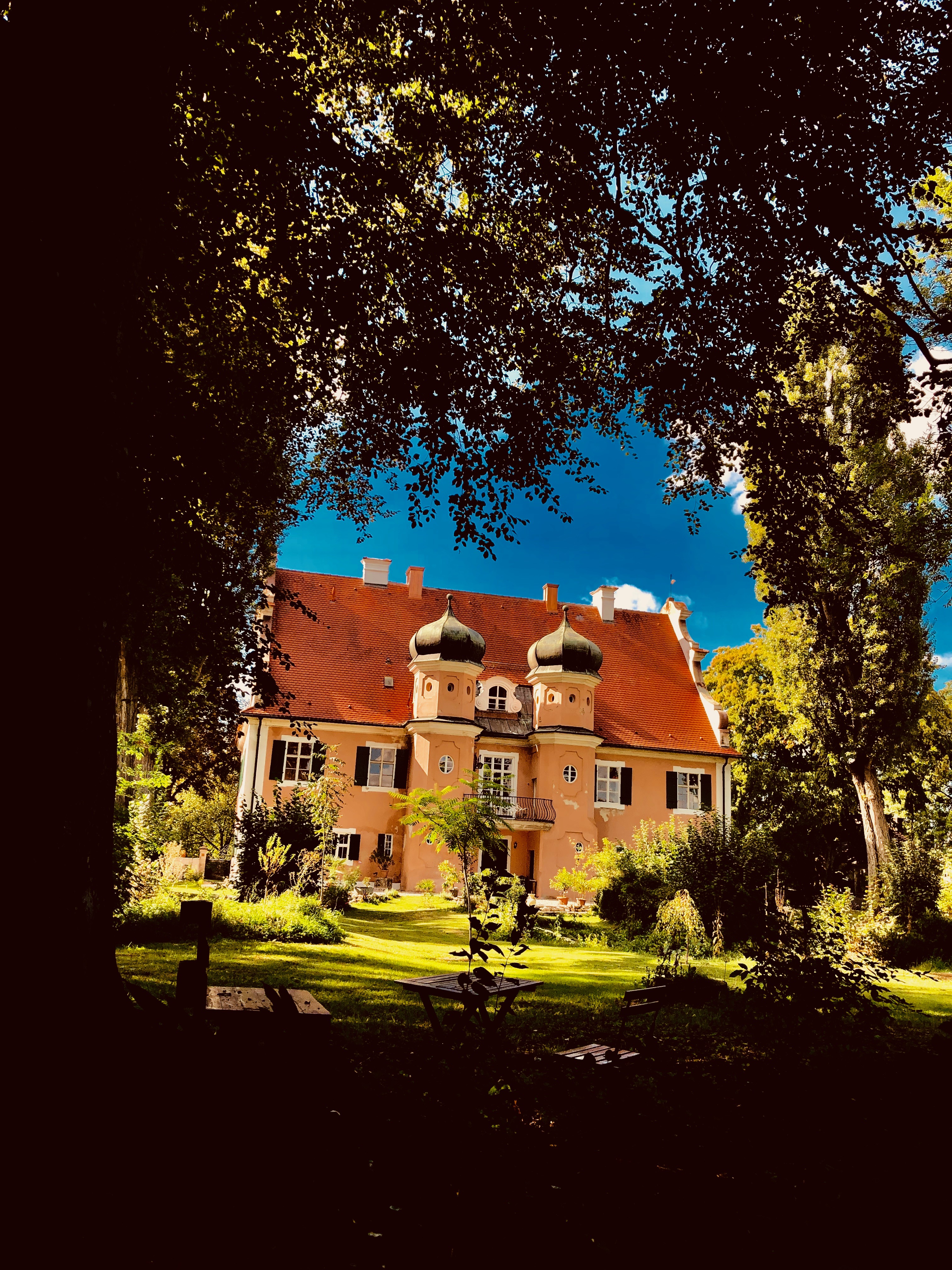 Schloss Donaumünster im Herbst 2019